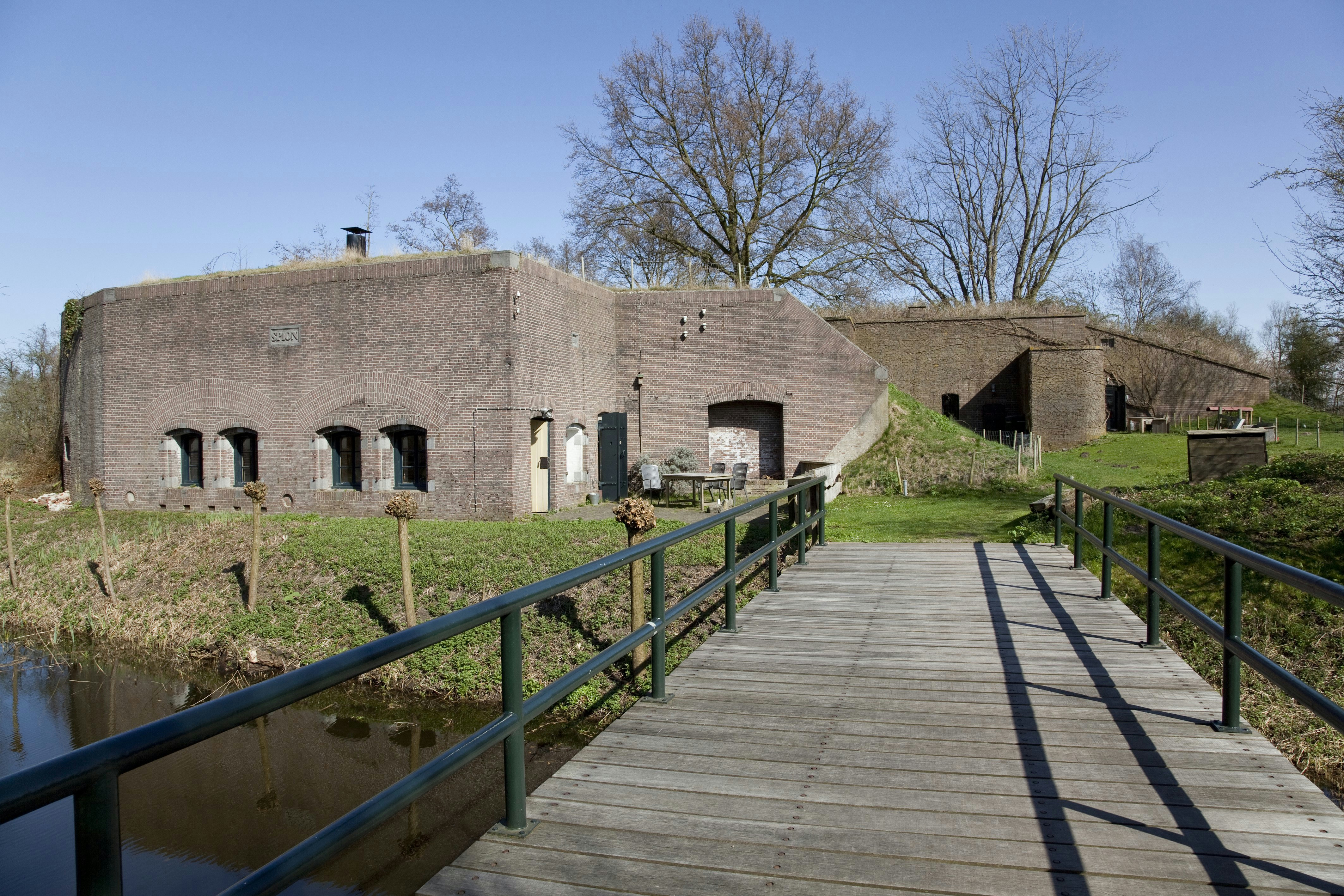 Fort Spion: Fort Spion (opmerking: Nieuwe Hollandse Waterlinie / Cluster 15)